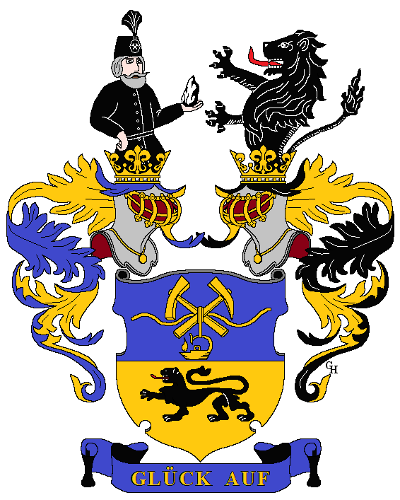 Wappen des österreichischen Beamten und Berghauptmanns Lukas von Kronig (1813–1888), verliehen anlässlich seiner Erhebung in den österreichischen Ritterstand 1883. Zeichnung von Gerd Hruška ( Für weitere Informationen zu dieser Standeserhebung siehe (